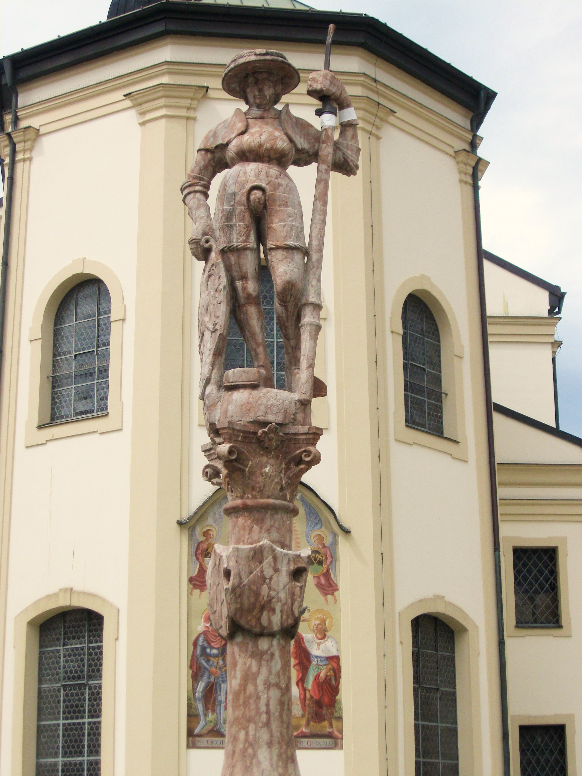 Stadtplatz; Lindlbrunnen, Brunnensäule mit Rotmarmor-Figur, von Meister Steffan errichtet, 1525/26, Brunnenbecken von 1646.